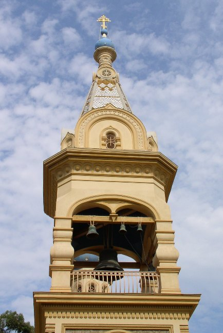 Вид колокольни церкви